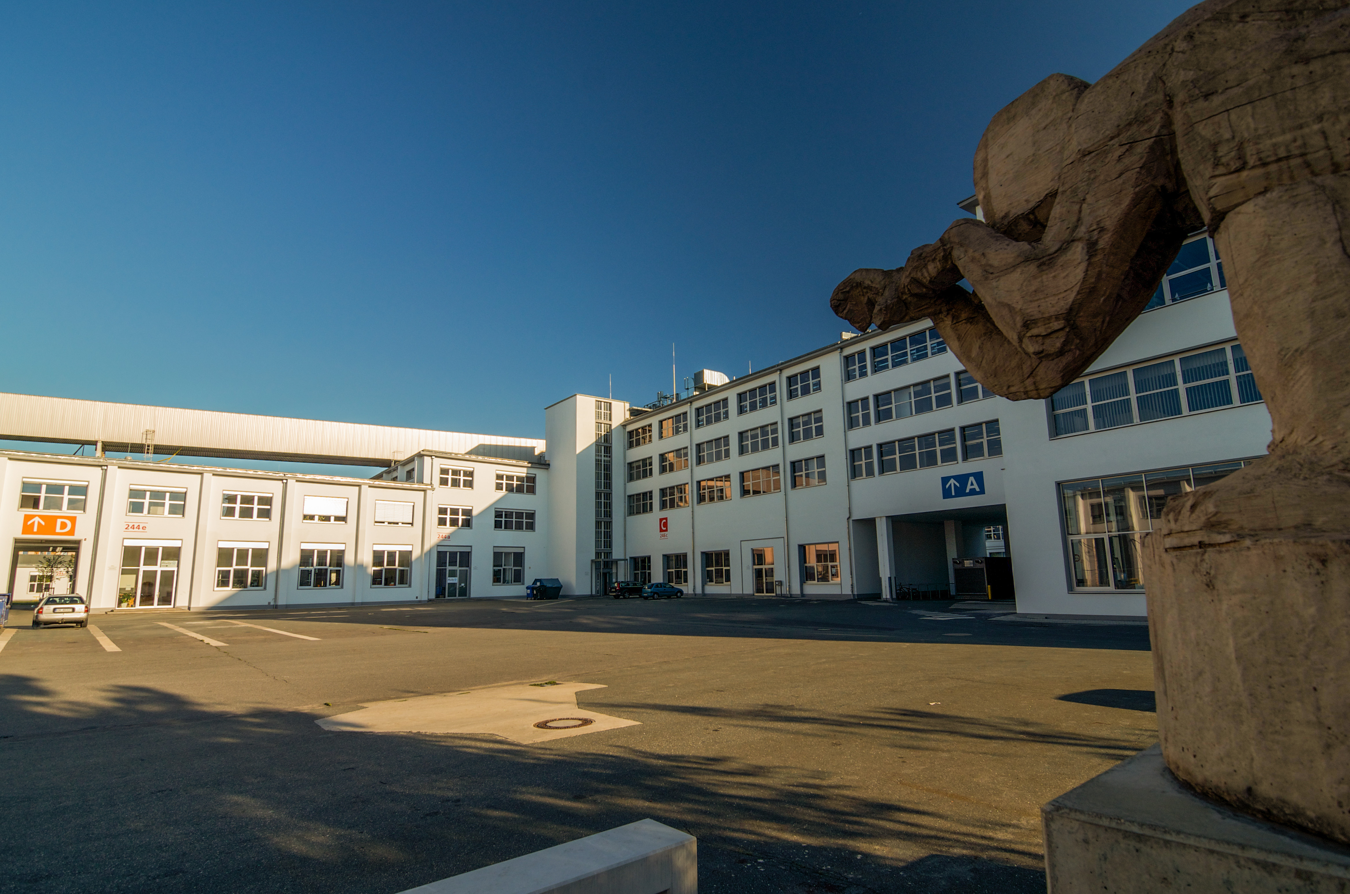 Auf AEG in Gostenhof, Nürnberg